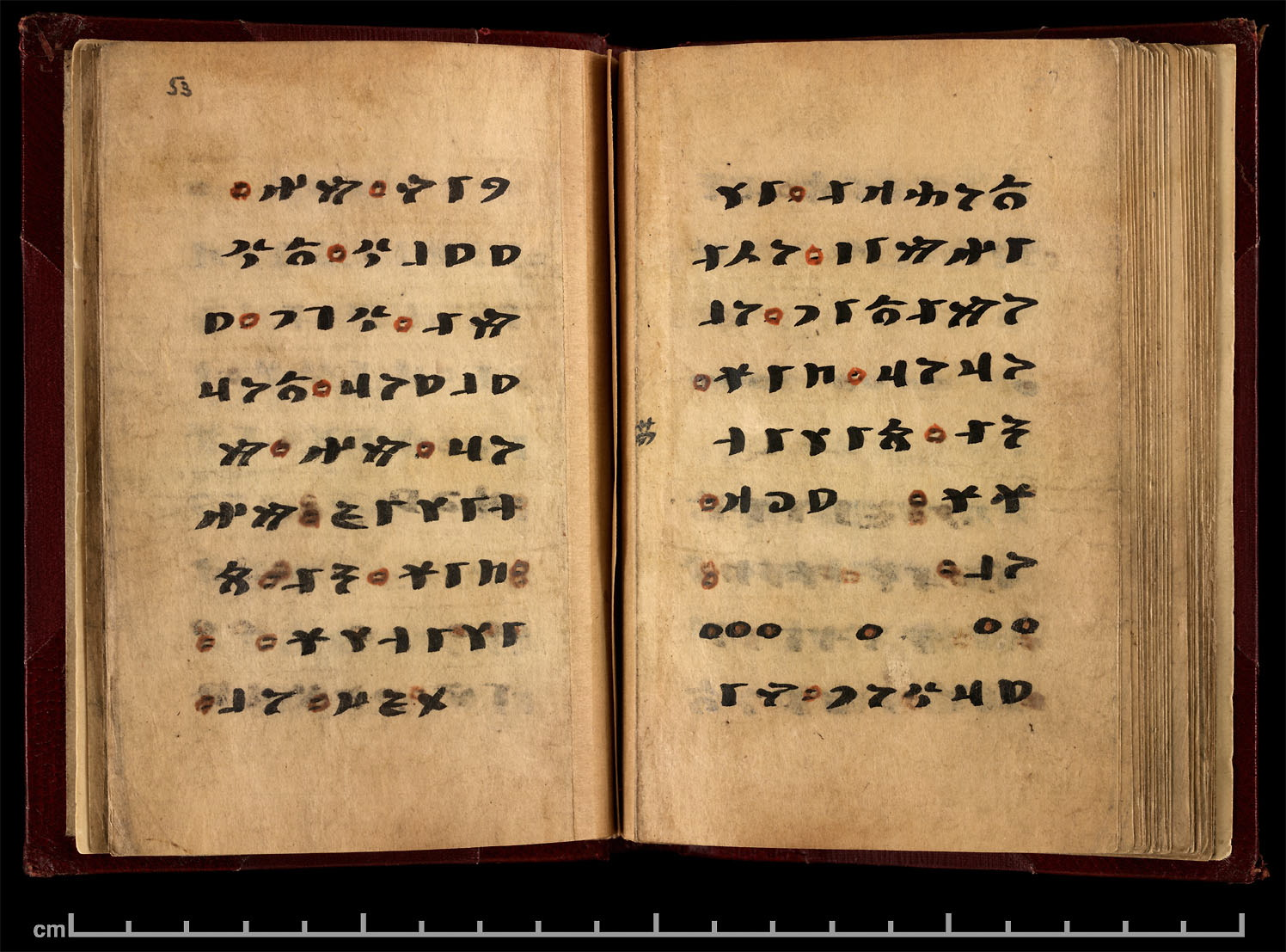 "Irk Bitig Fal Kitabı" page 53